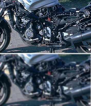 Gegenüberstellung scharf / unscharf